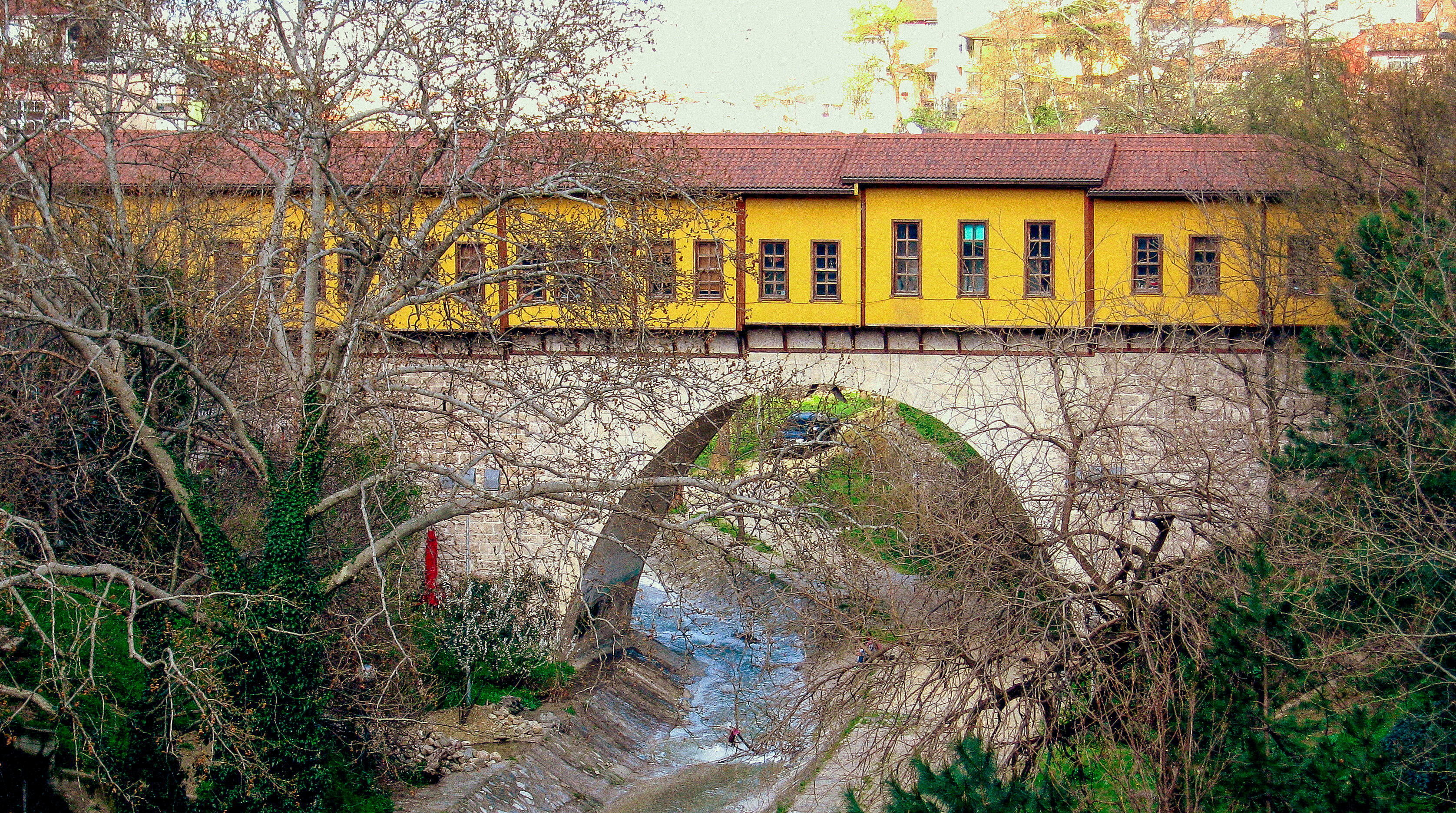 ırgandı köprüsü bursa